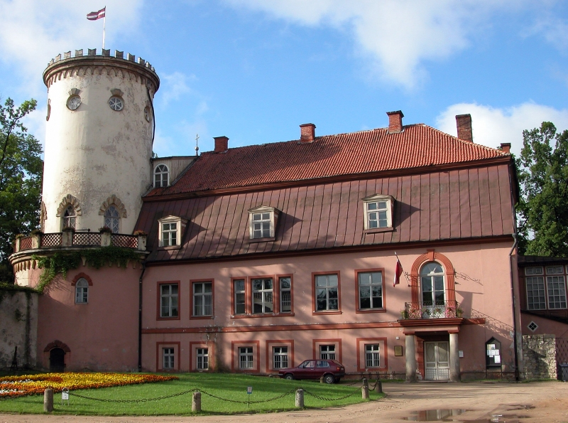 Cēsis in Lettland. Cēsis, Latvia.